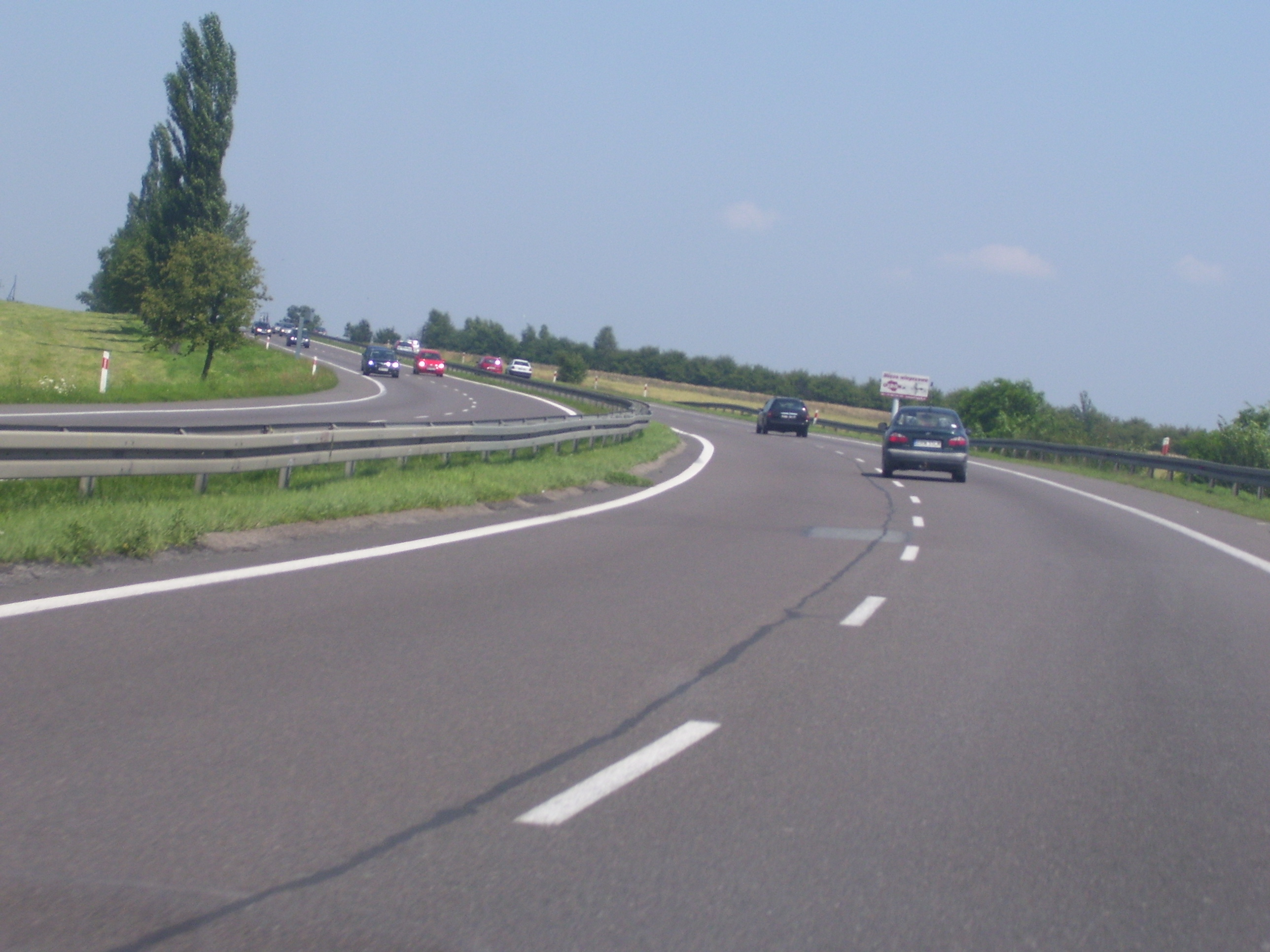 DK8 (Poland) Droga krajowa nr 8 na wysokościu miejscowości Babsk